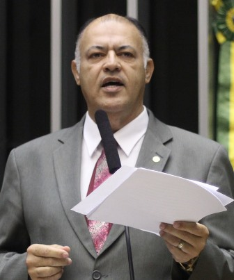 Pastor Eurico na Tribuna